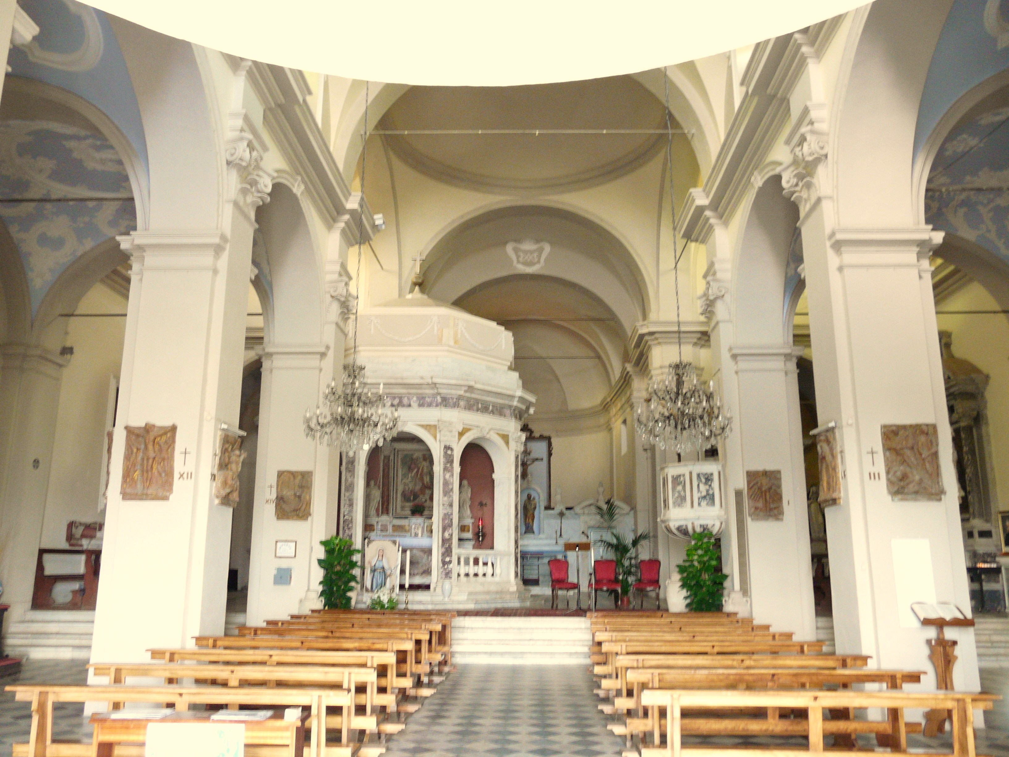 Santuario della Beata Vergine Addolorata del Mirteto, Ortonovo, Liguria, Italia